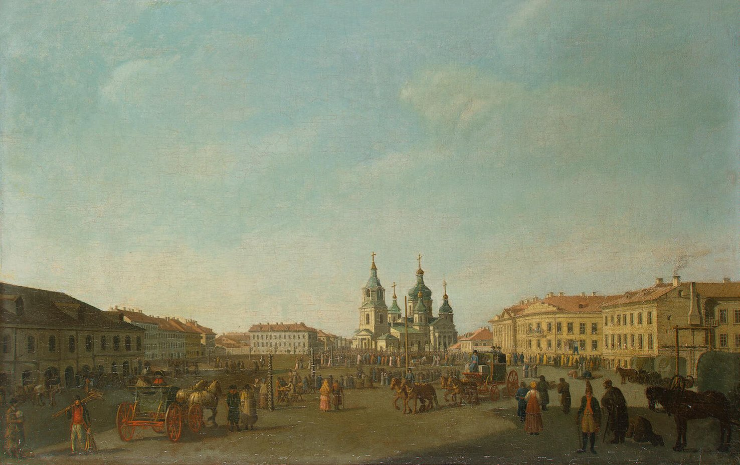 View of the Sennaya Square in Petersburglabel QS:Len,"View of the Sennaya Square in Petersburg"label QS:Lru,"Картина «Вид Сенной площади в Петербурге» работы Бенжамена Патерсена. Картина поступила в Эрмитаж из Государственного Русского музея (ГРМ) в 1950 году."